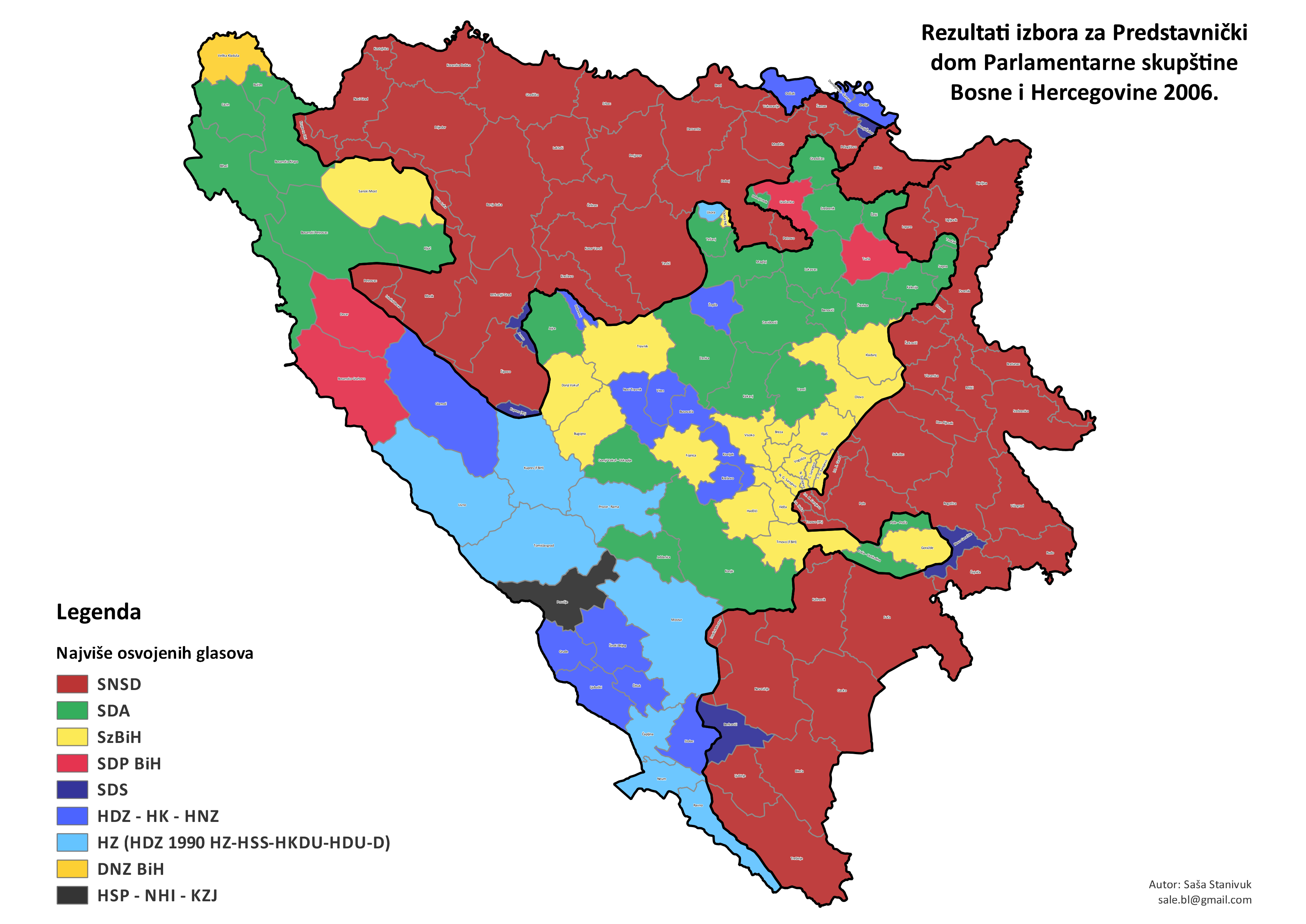 Srpskohrvatski / српскохрватски: Izbori za Parlamentarnu skupštinu BiH 2014. godine